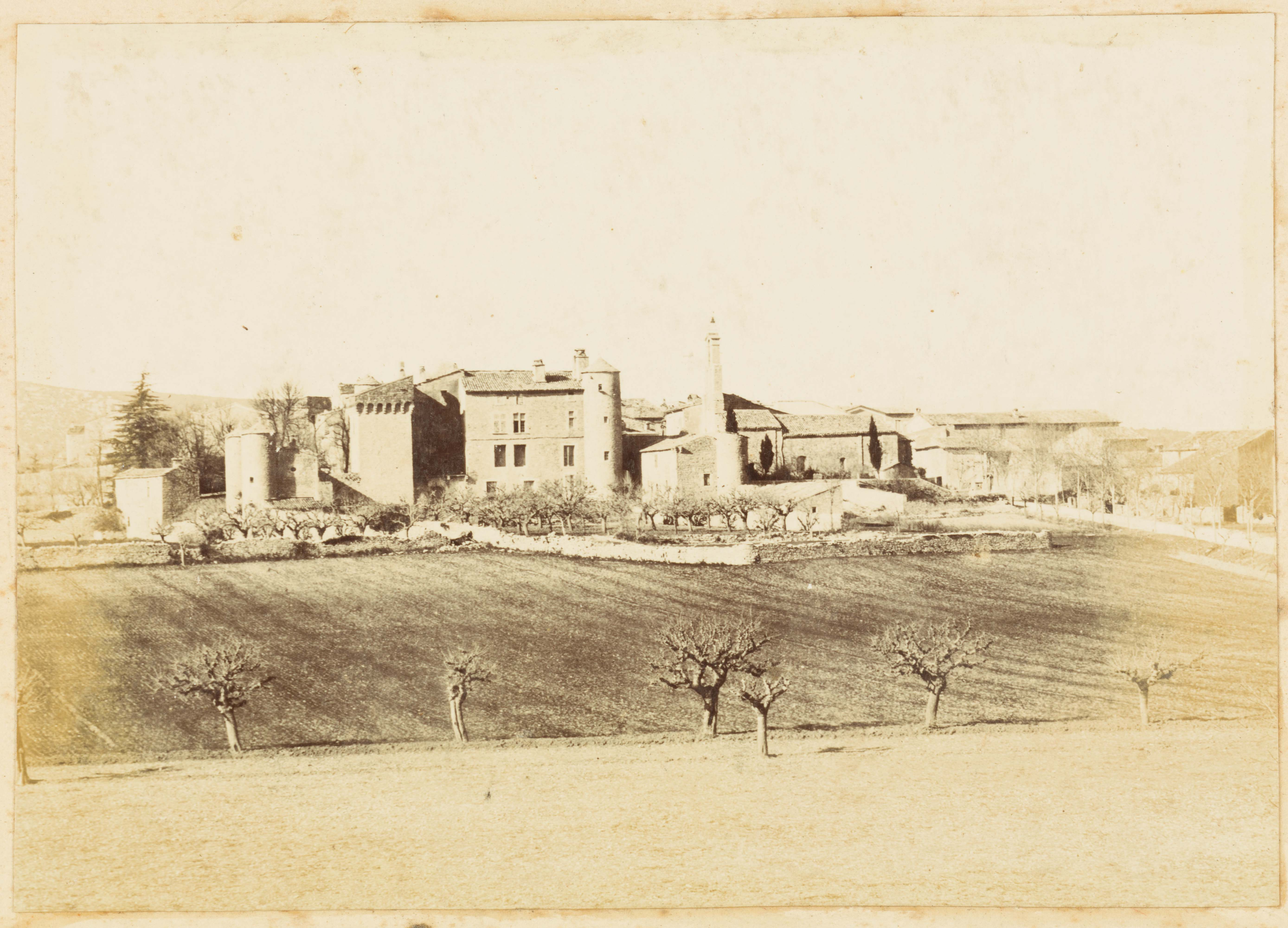 Notre-Dame-de-Londres. - Vue générale : photographie.